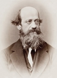 George Martin Lane